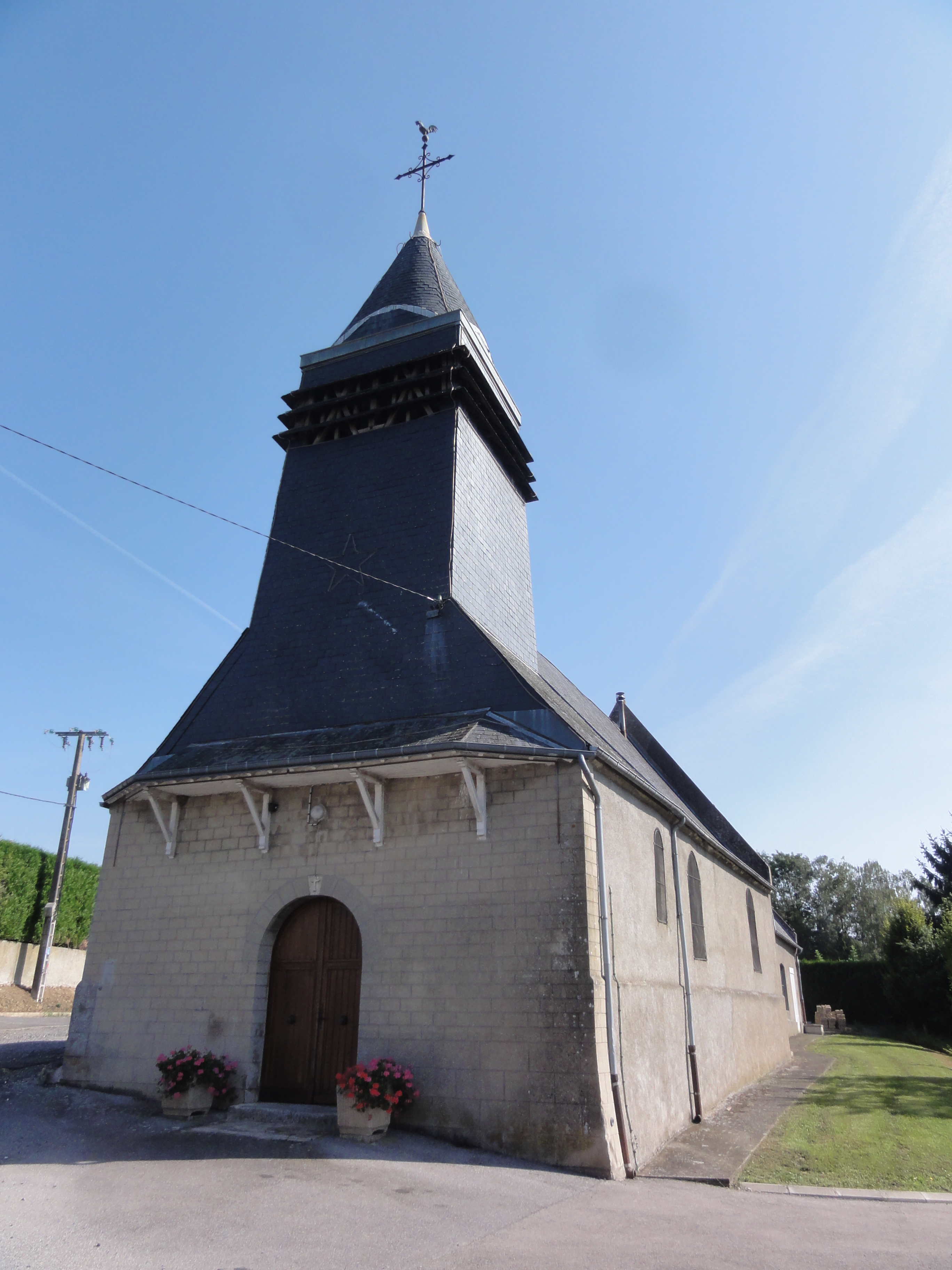 Regny (Aisne) église Saint Martin